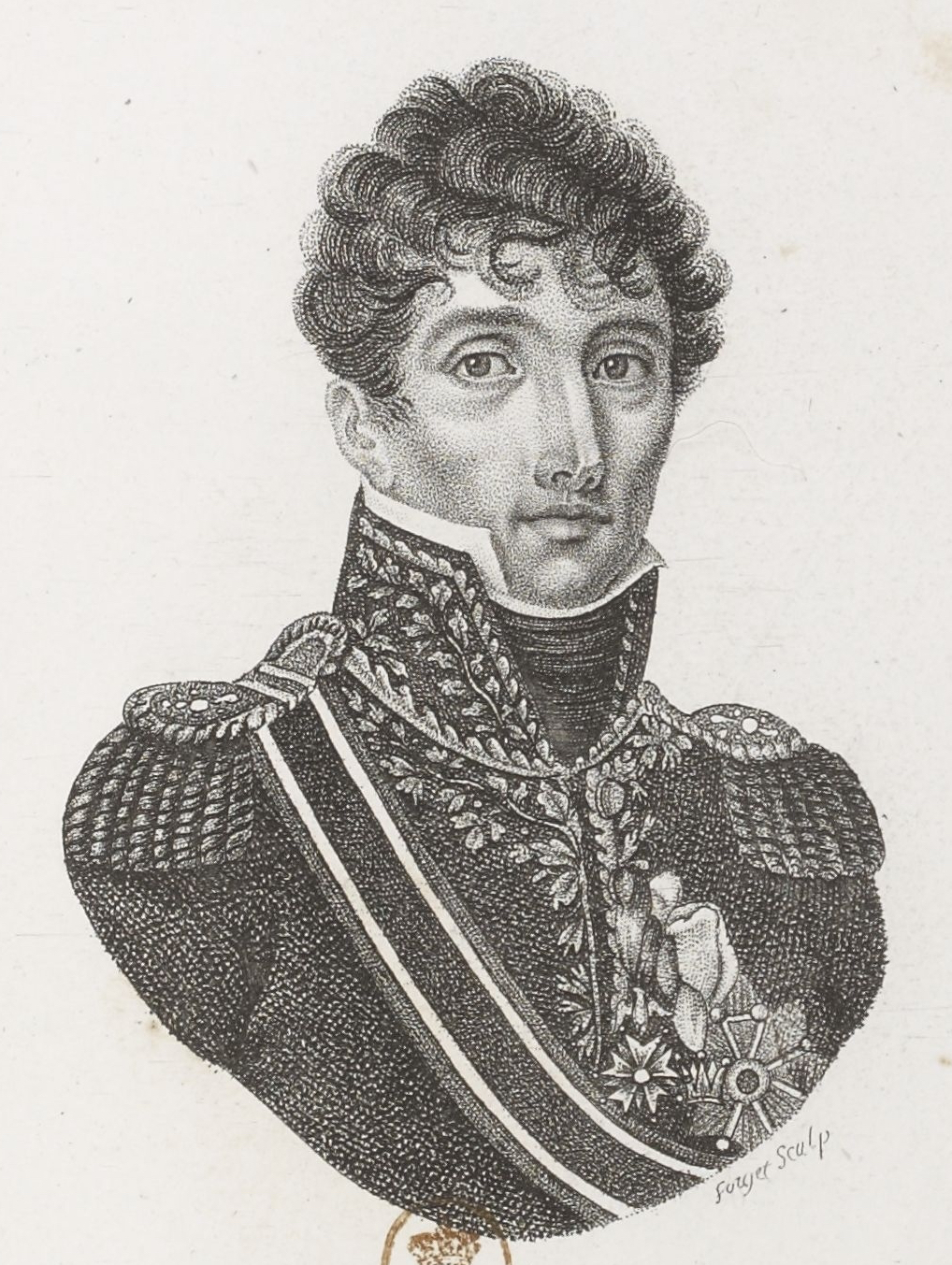 Marc-Antoine de Beaumont (1763-1830), général de division et comte de l'Empire.